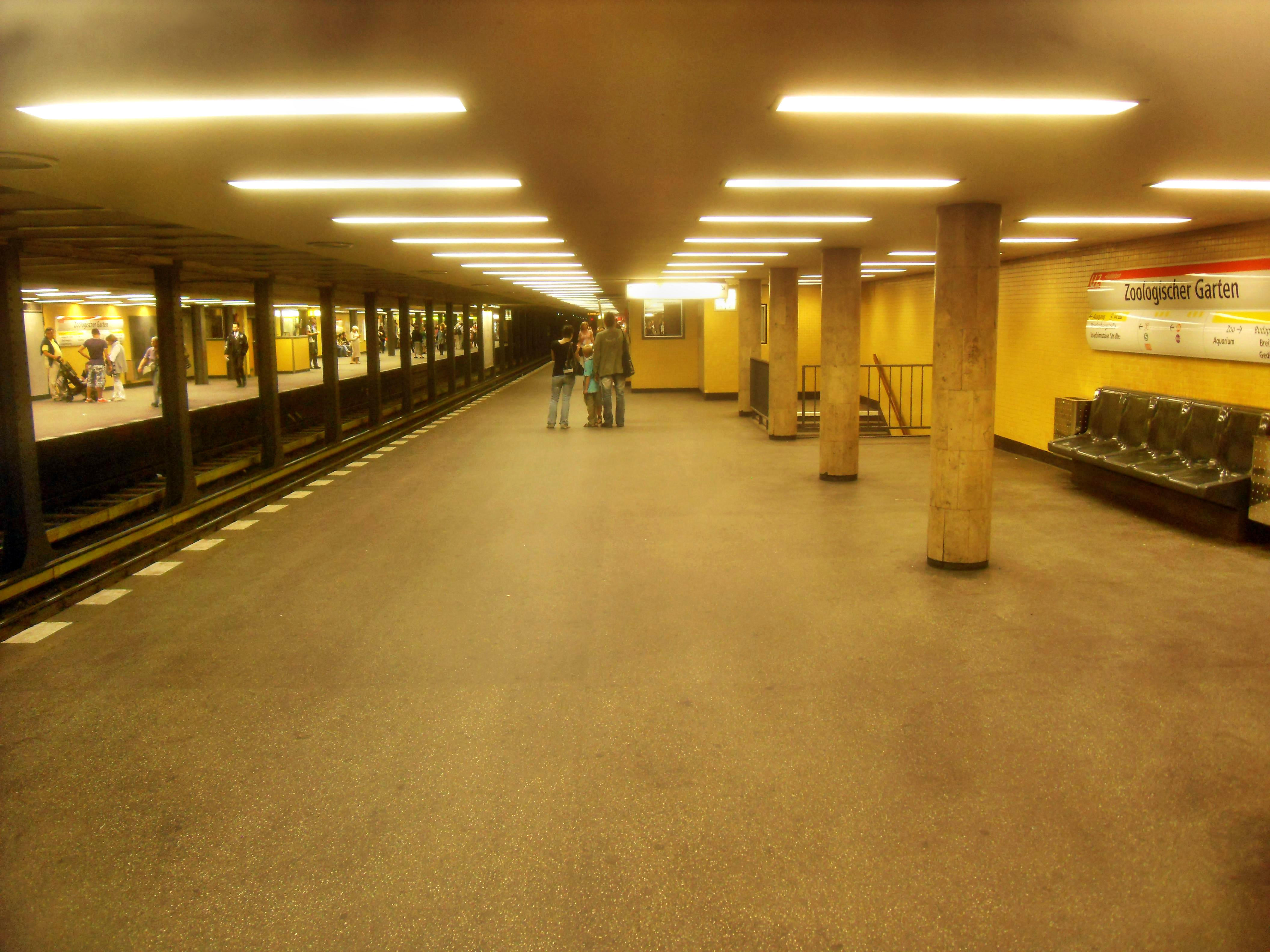 Bahnsteig der Linie U 2 der U-Bahn Berlin des U-Bahnhofs Berlin Zoologischer Garten in Deutschland